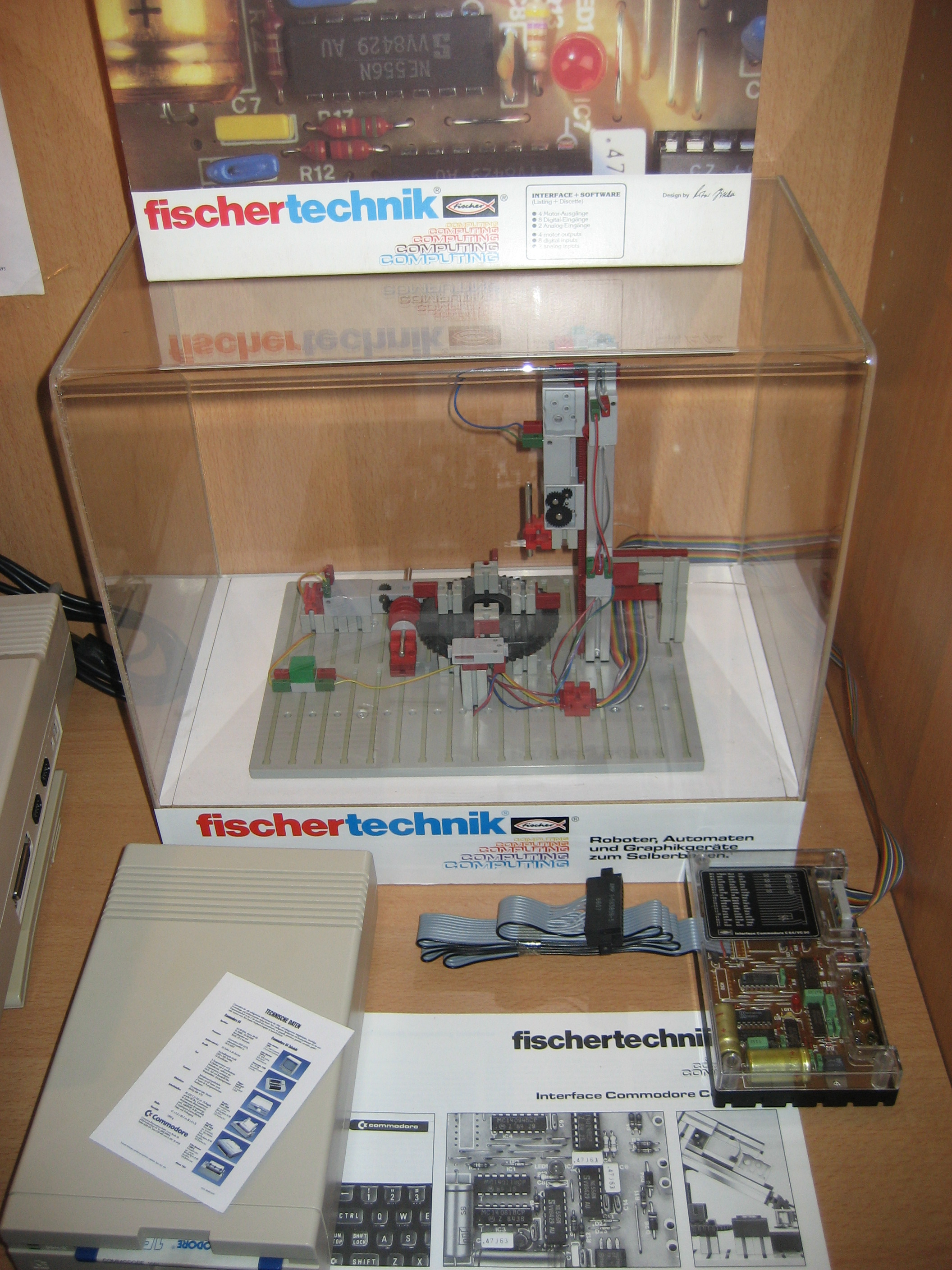 Fischertechnik Computing Roboterbausatz mit C64 Interface (user port)